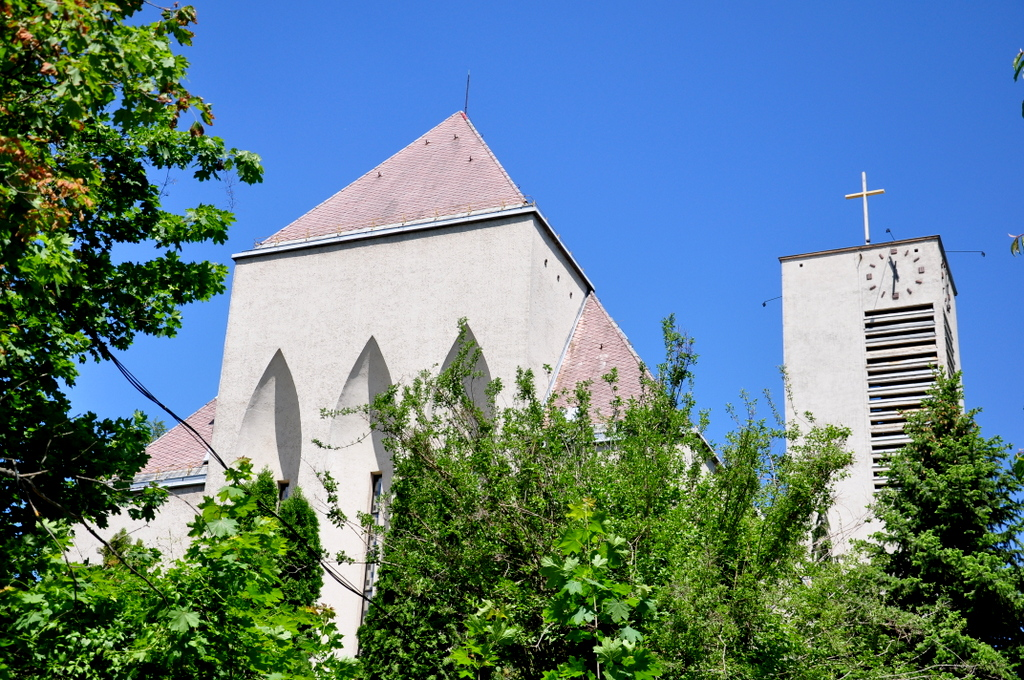 Holy Spirit church in Pesthidegkút, Budapest